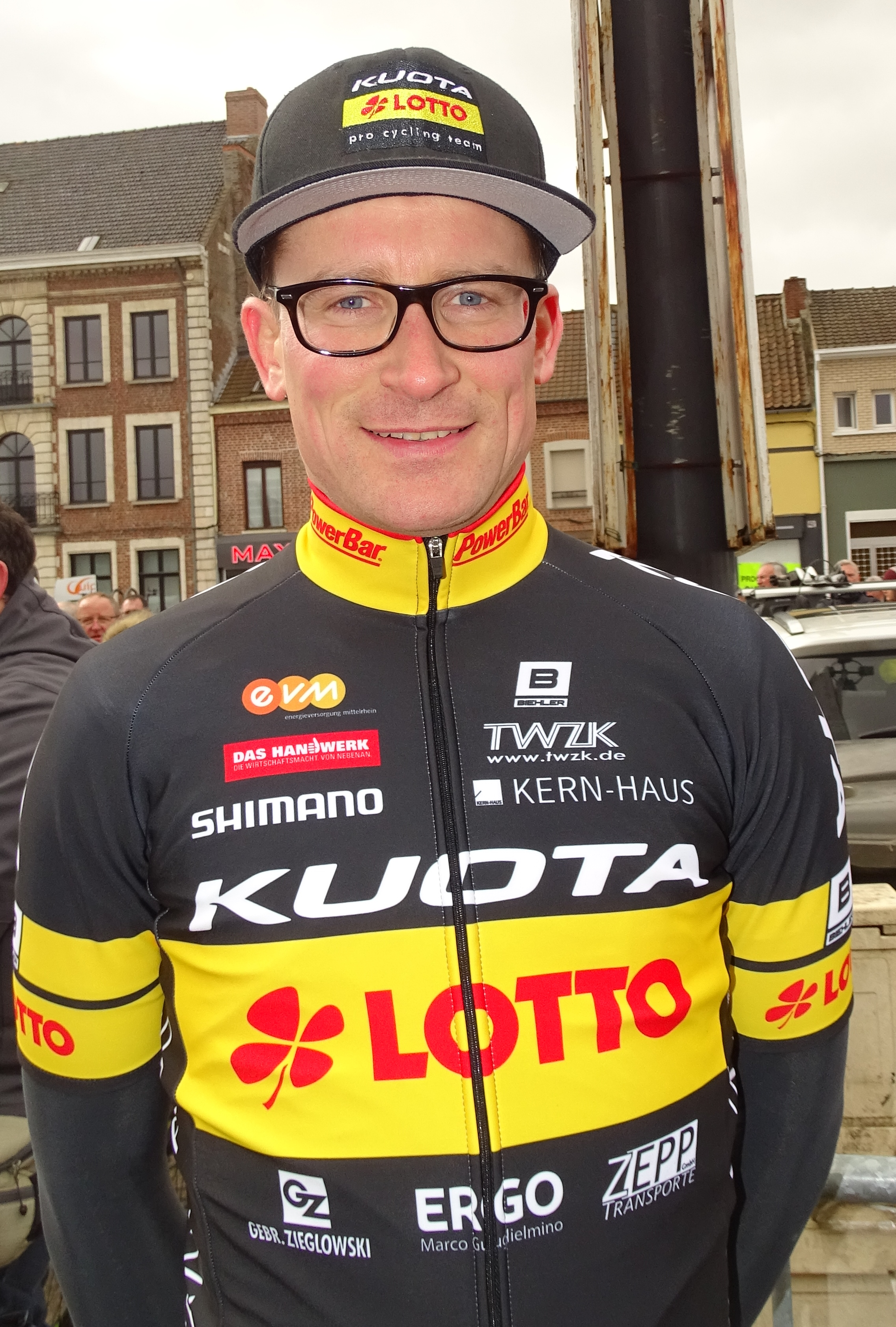 Reportage réalisé le dimanche 6 mars à l'occasion du départ et de l'arrivée du Grand Prix de Lillers-Souvenir Bruno Comini 2016 à Lillers, Pas-de-Calais, Nord-Pas-de-Calais, France.